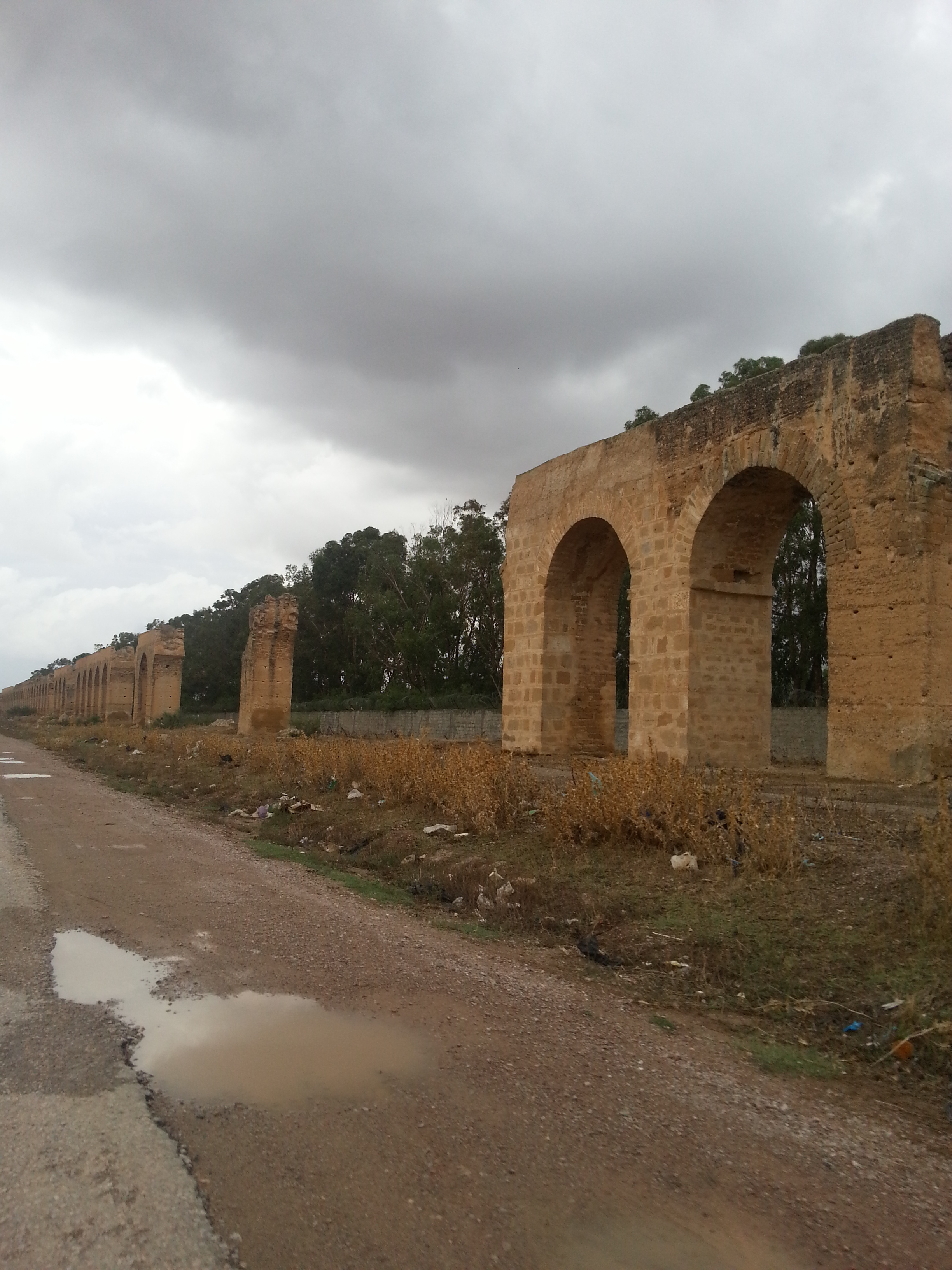 Aqueduc de Zaghouan à Carthage, Zaghouan